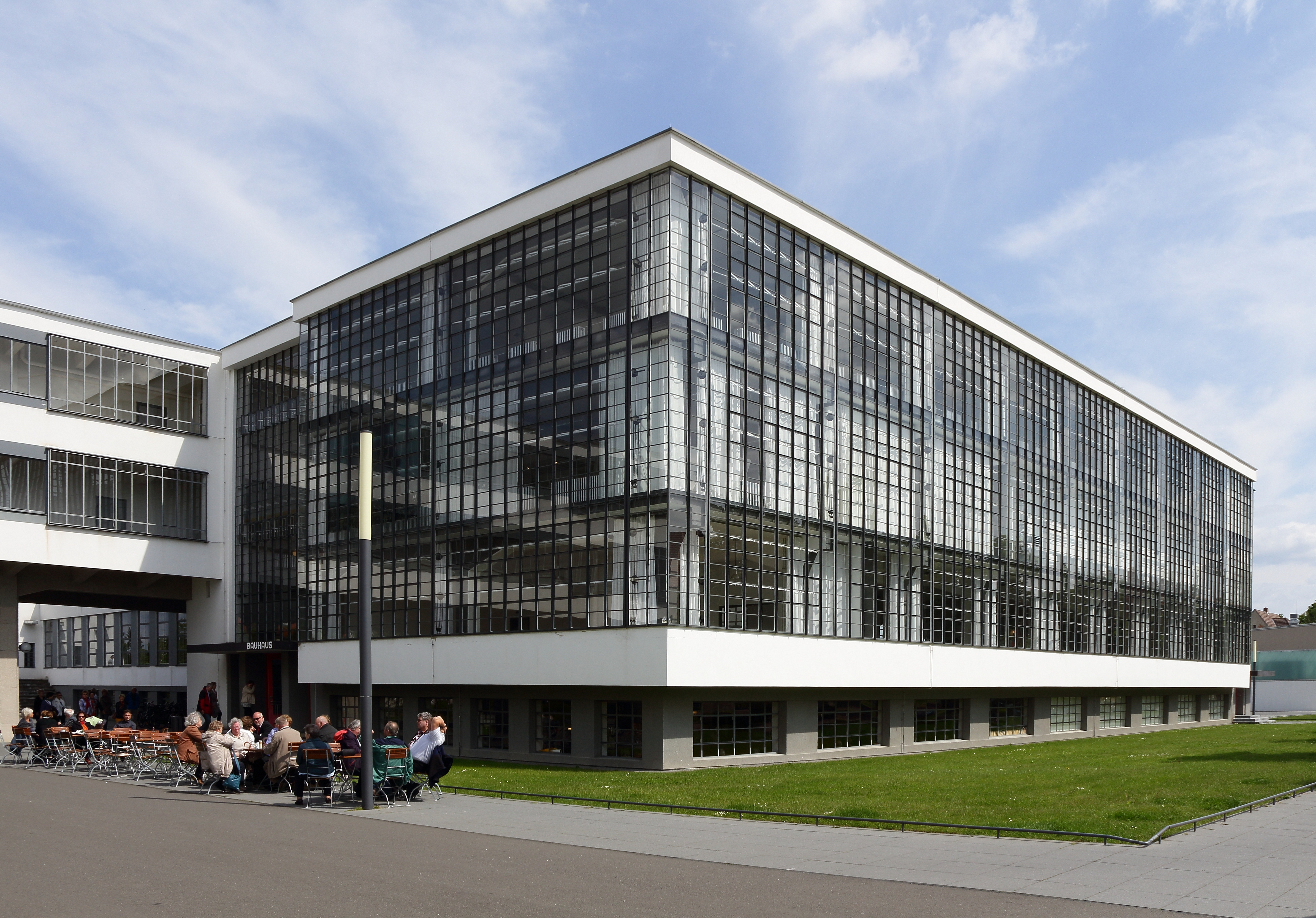 Meisterhäuser-Bauhaus